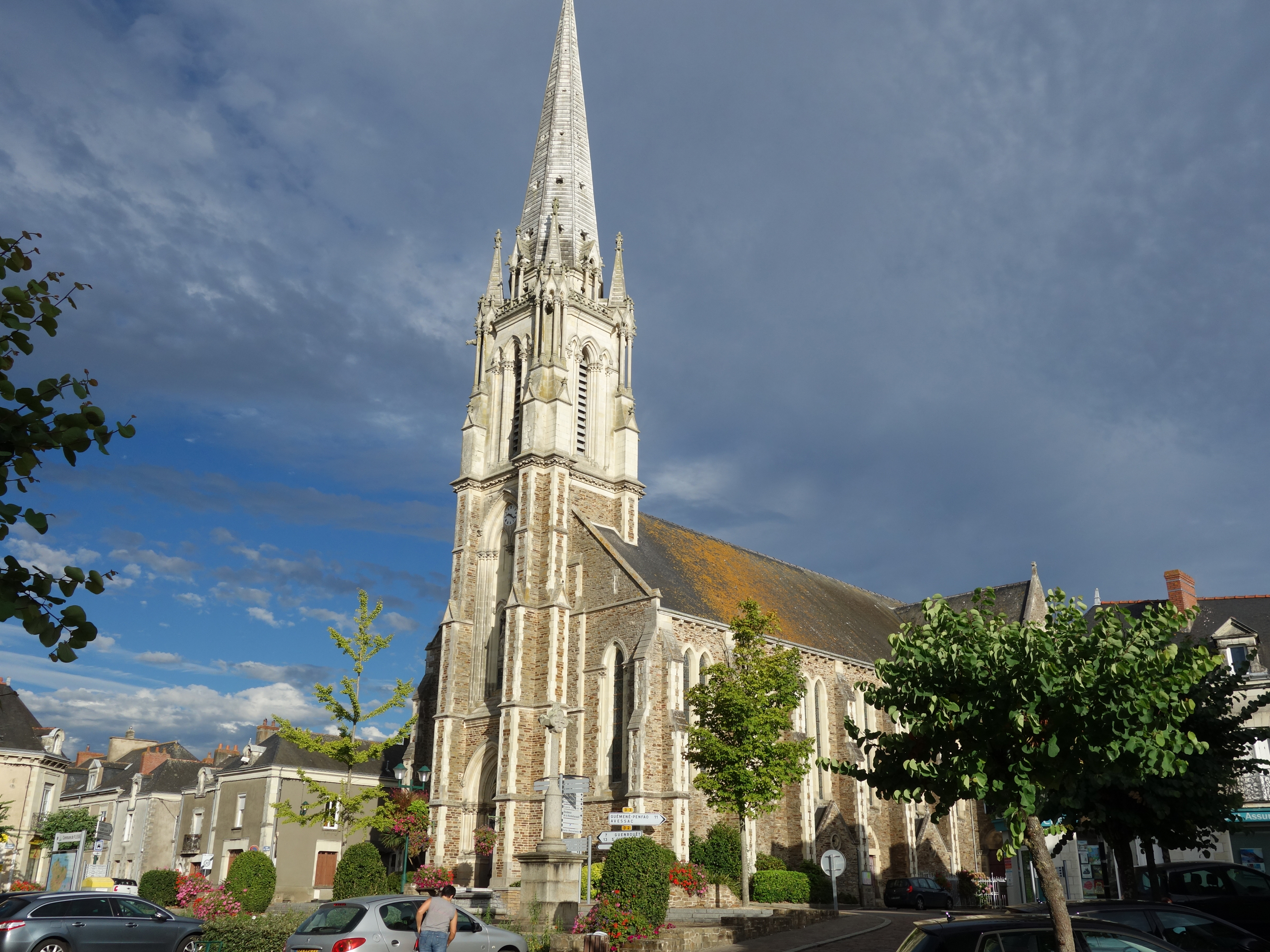 L'église Saint-Pierre de Plessé (1875). Cette église se compose d'une nef et de bas-côtes, d'un transept et d'un chevet à pans. On y voit une statue de saint Clair datant du XVIème ou XVIIème siècle.